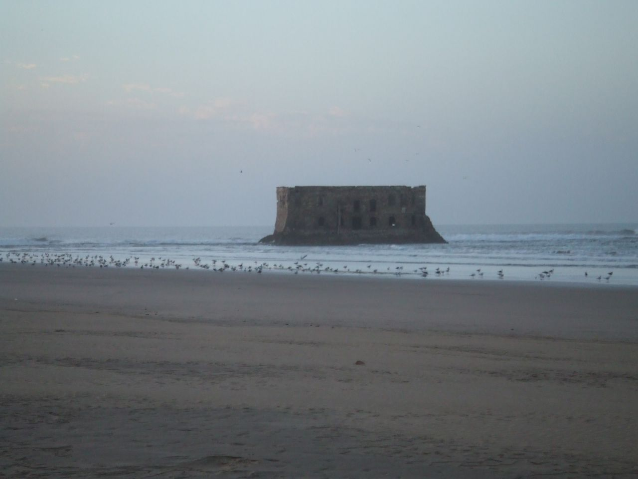 La Casa Del Mar, fortificación construida en 1889 por Donald Mackenzie, propietario de la compañía comercial North West African Company Imperial, que estableció un puesto comercial en Tarfaya.